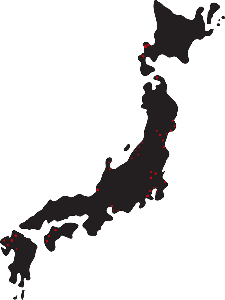 japonian dauden zentral nuklearren mapa